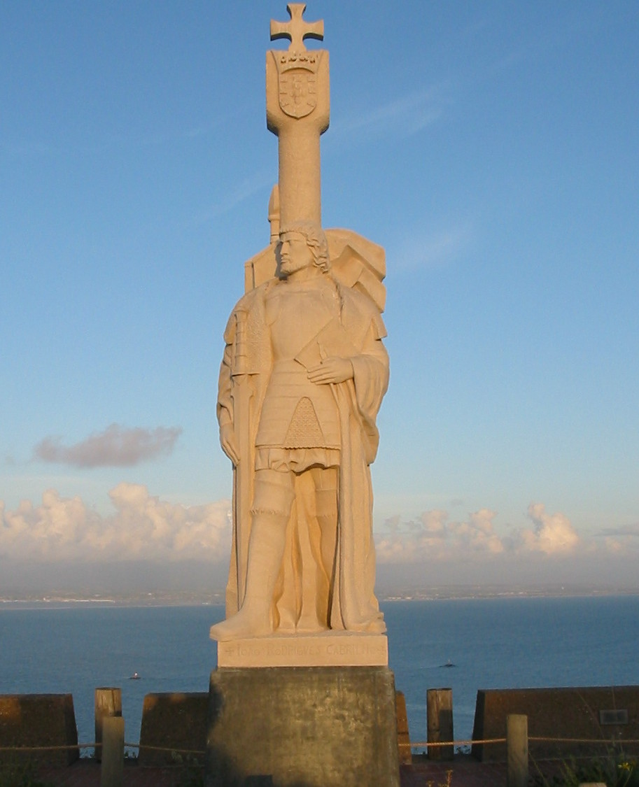 Cabrillo National Monument, San Diego.